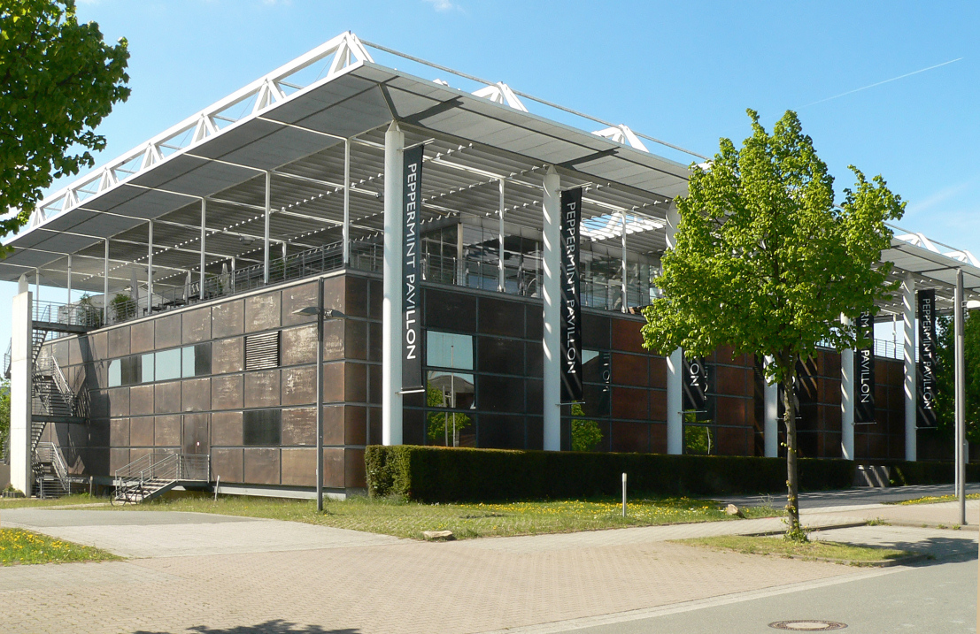 Expo 2000 Pavillon Belgien